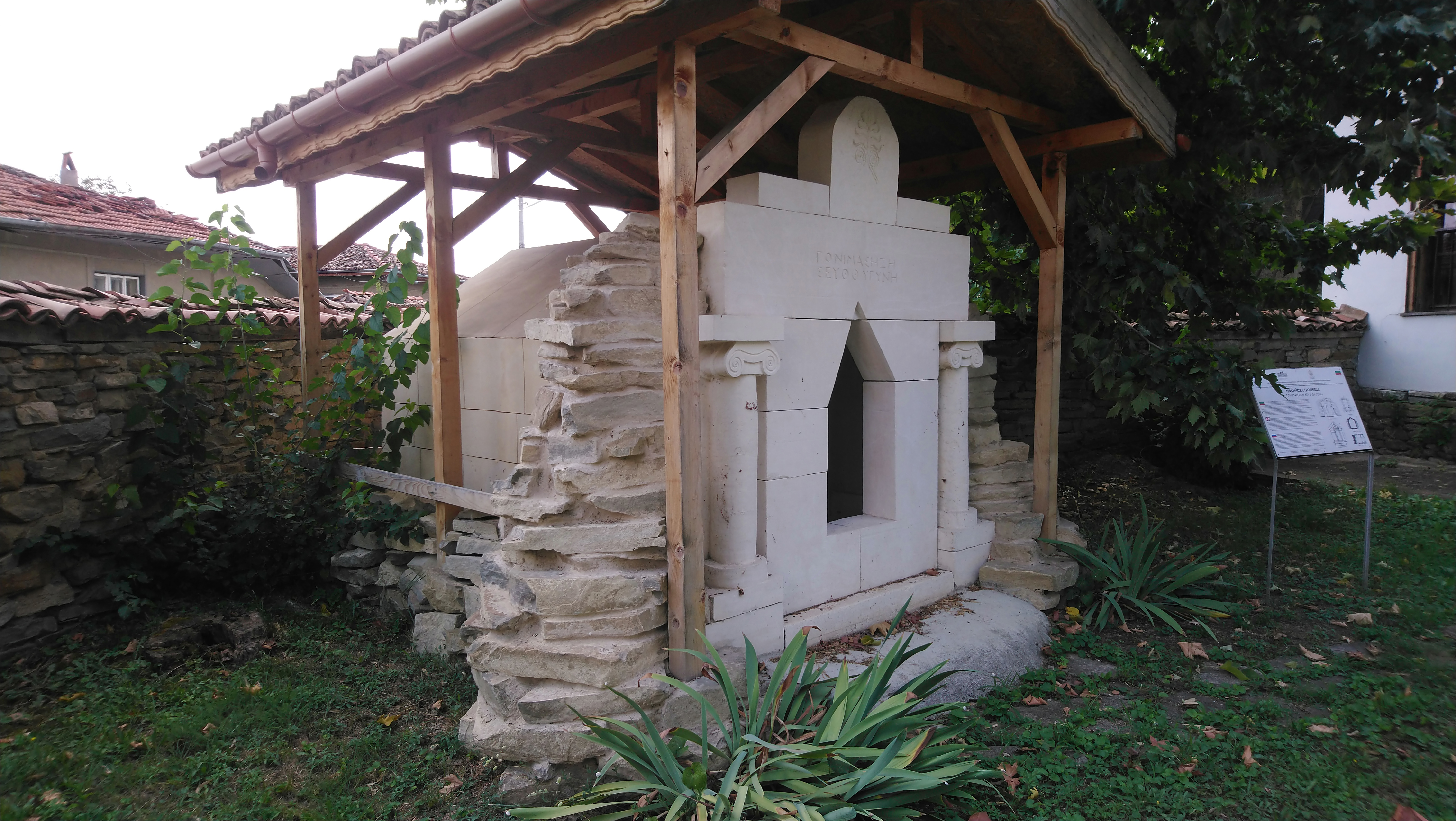 Смядово - тракийската гробница